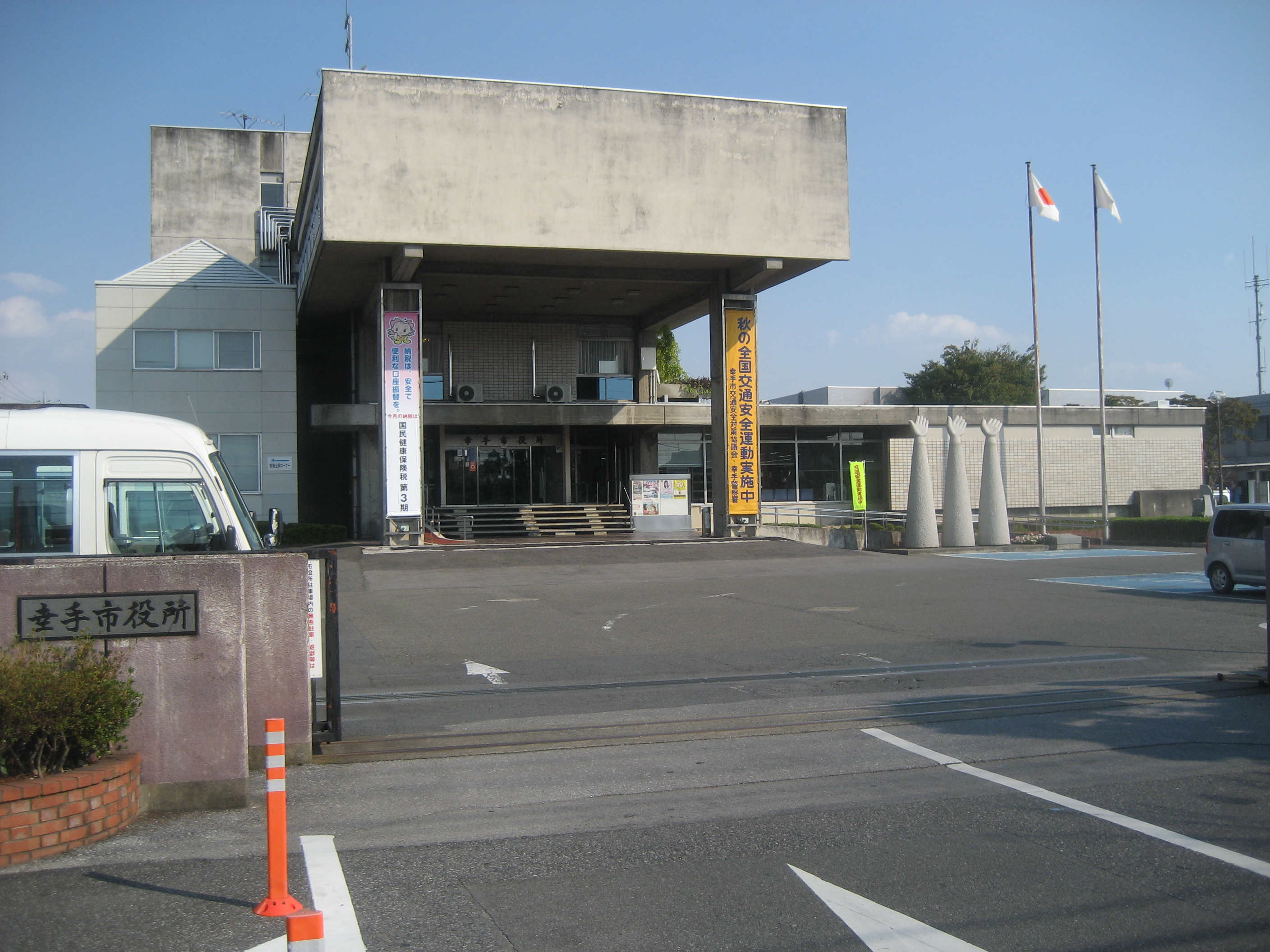 幸手市役所庁舎